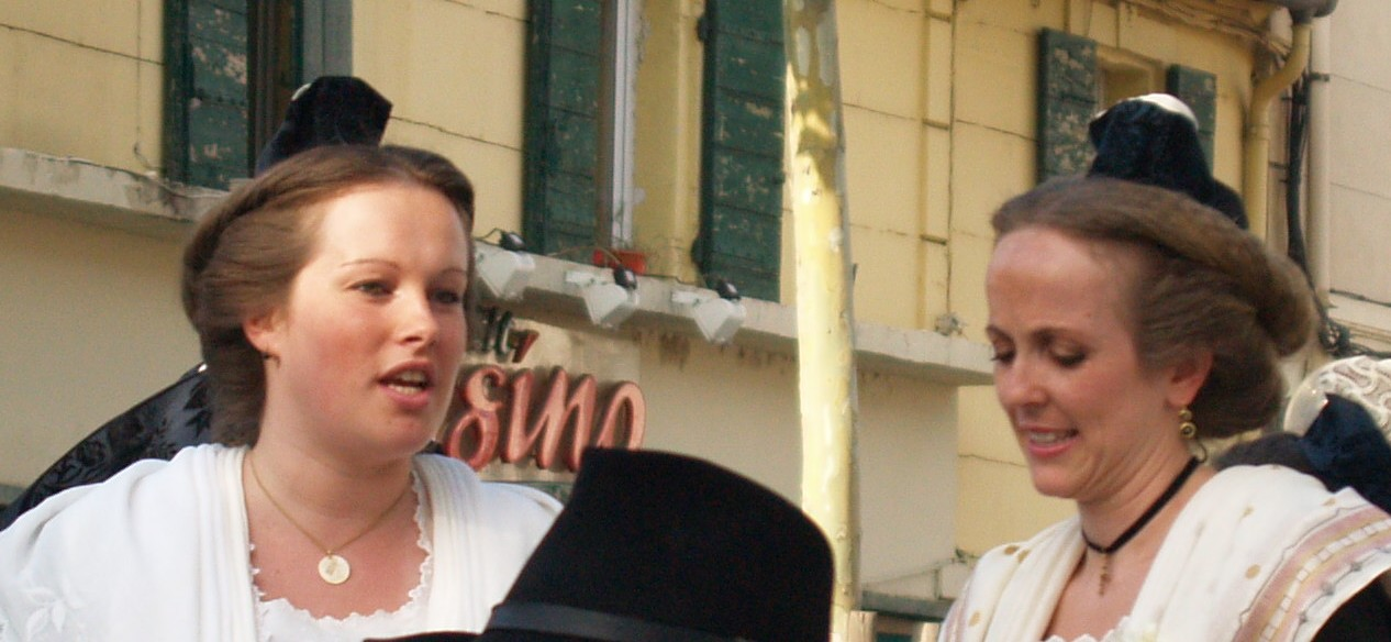 Aurore Guibaud (XVIIieme reine) à droite et Emeline Enjalbert (Demoiselle d'honneur de Nathallie Chay)